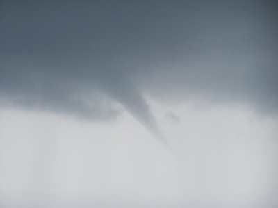 tuba (trechter) aan de basis van een buienwolk, Woensdrecht 12 augustus 2006